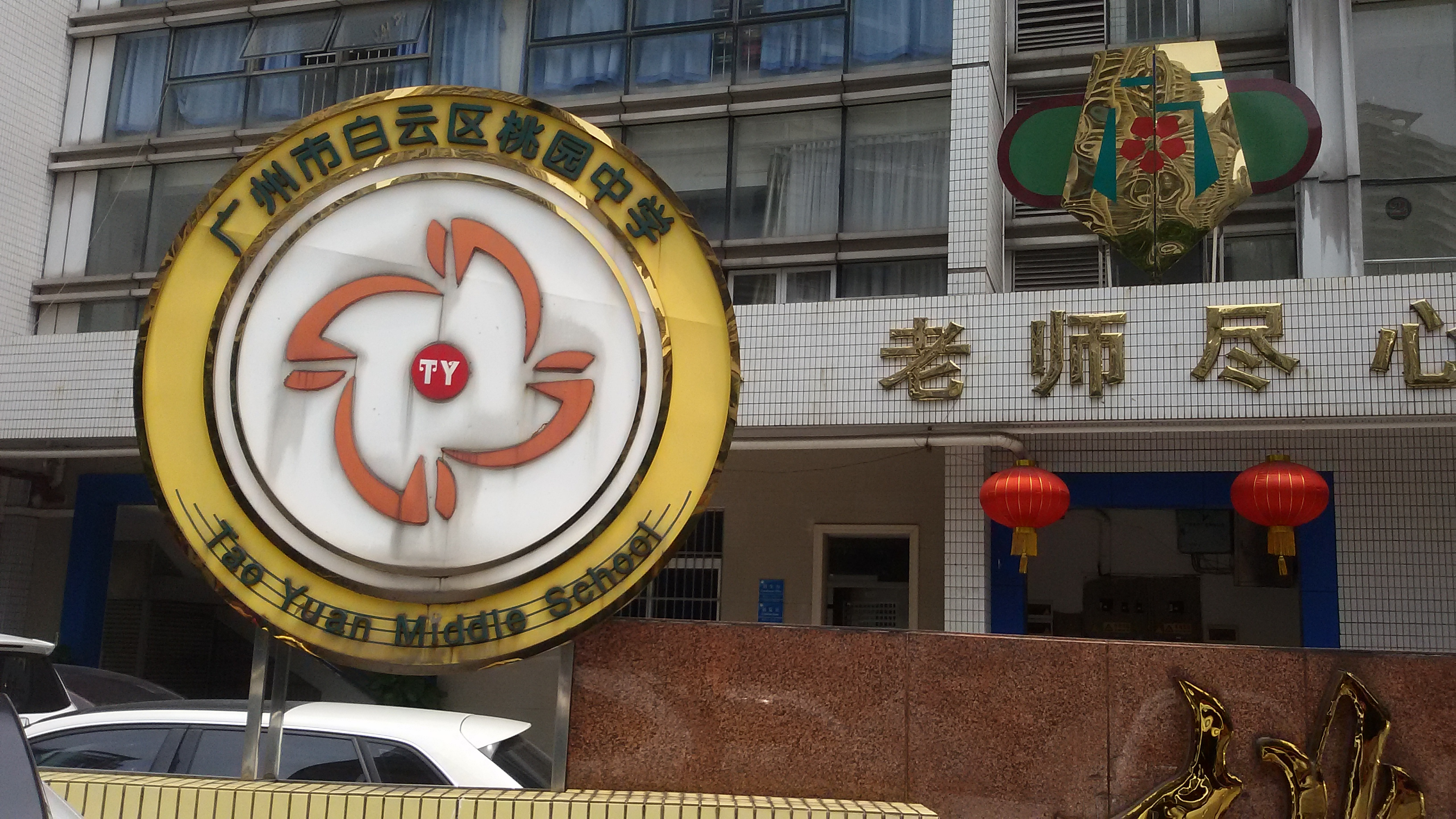 粵語: 白云区桃园中学同广州市第65中学嘅校徽